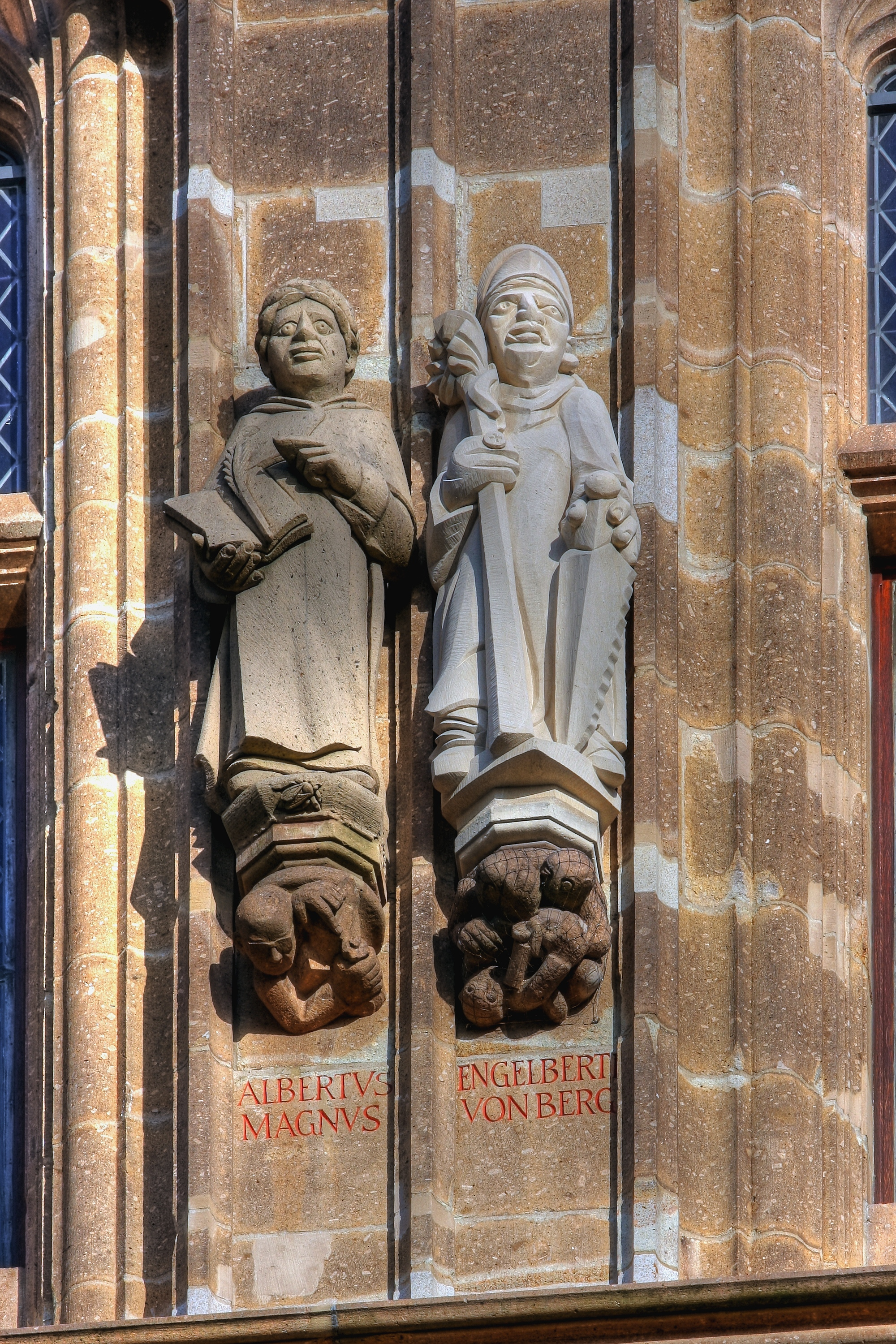 Rathausturm Köln mit den Figuren von: Albertus Magnus - Engelbert von Berg Details zu den Statuen: Bildhauer der Statue des Albertus Magnus: Titus Reinarz Bildhauer der Statue des Engelbert von Berg: Titus Reinarz Details zu den Konsolen: Thema der Konsole unter der Statue des Albertus Magnus: „Professor Dr. Walter Bader“. Bildhauer: Gerd Haas Thema der Konsole unter der Statue des Engelbert von Berg: „Postengerangel“. Bildhauer: Gerd Haas